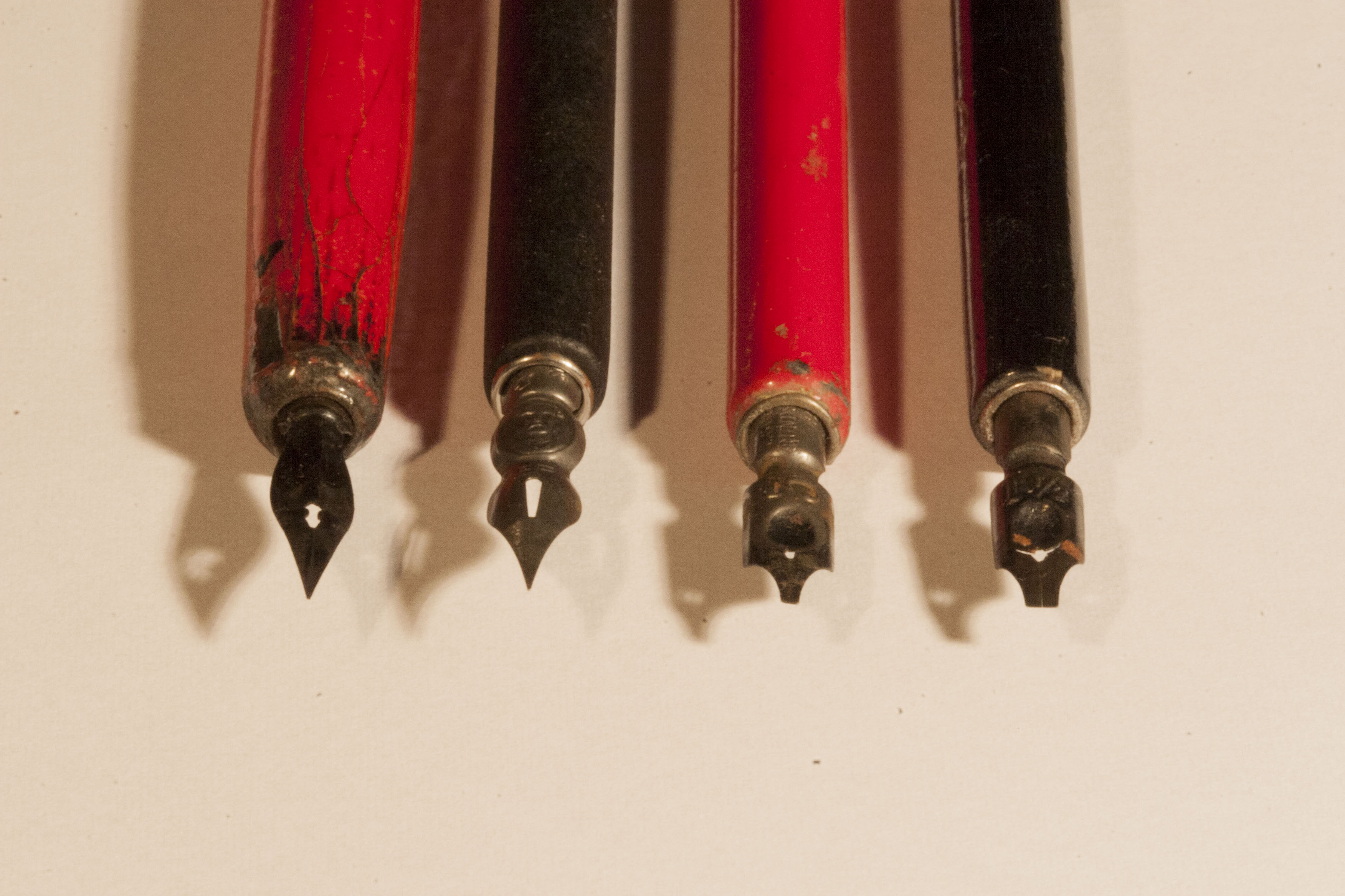 En samling stålpenne. Fra v.: Elastikpen, kongepen og to bredpenne